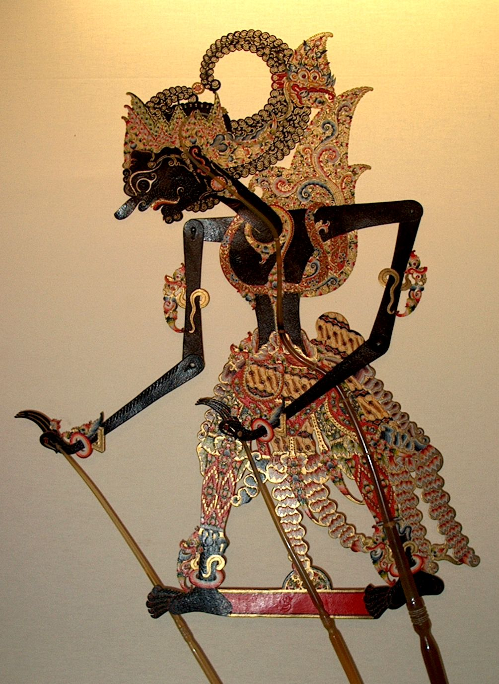 ini adalah paraga wayang Gathutkaca lakon Mahabarata